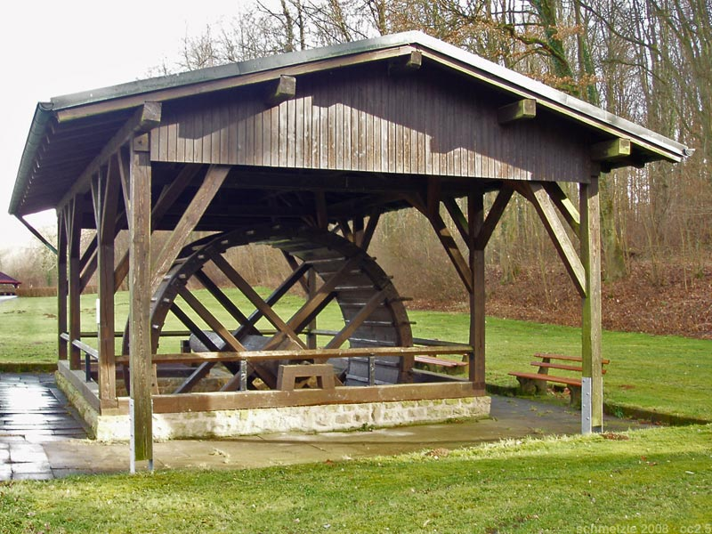 Tretrad (Salinenkuh) der Saline in Bad Rappenau